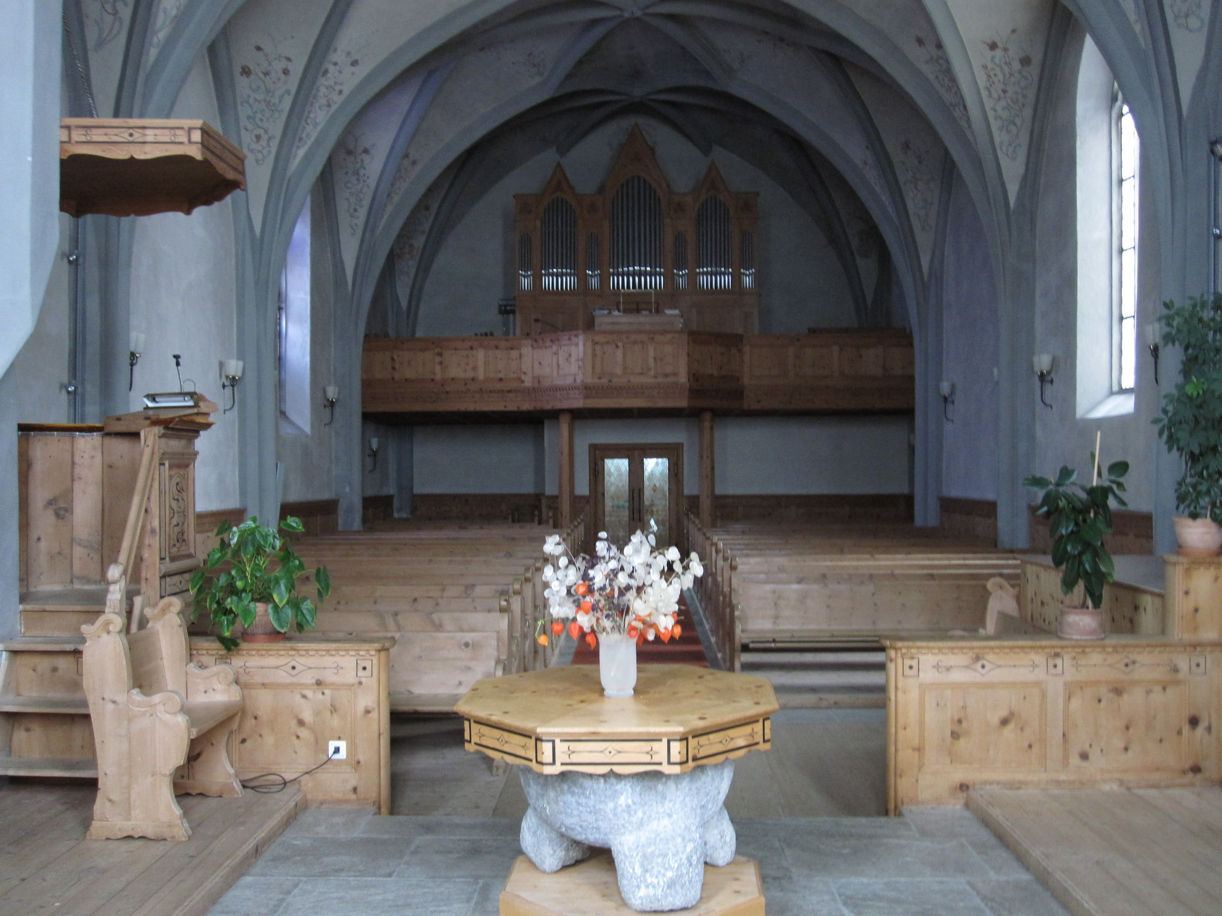 reformierte Kirche in Sent